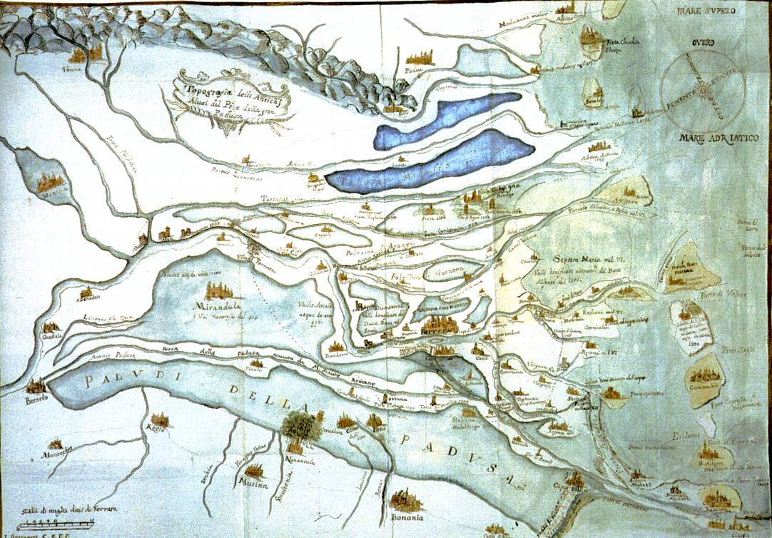 photo d'une carte de 1570 des paludes du Pô.